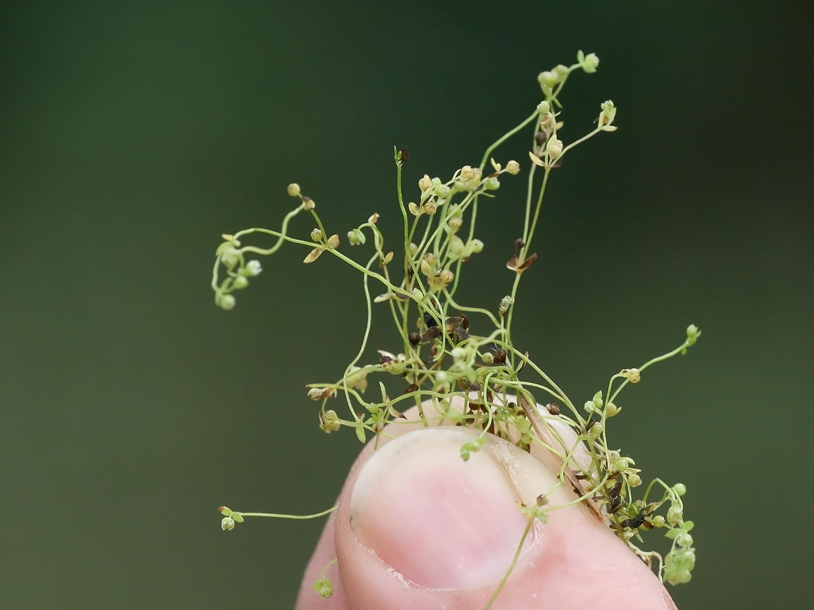 Zwerg-Lein (Radiola linoides)